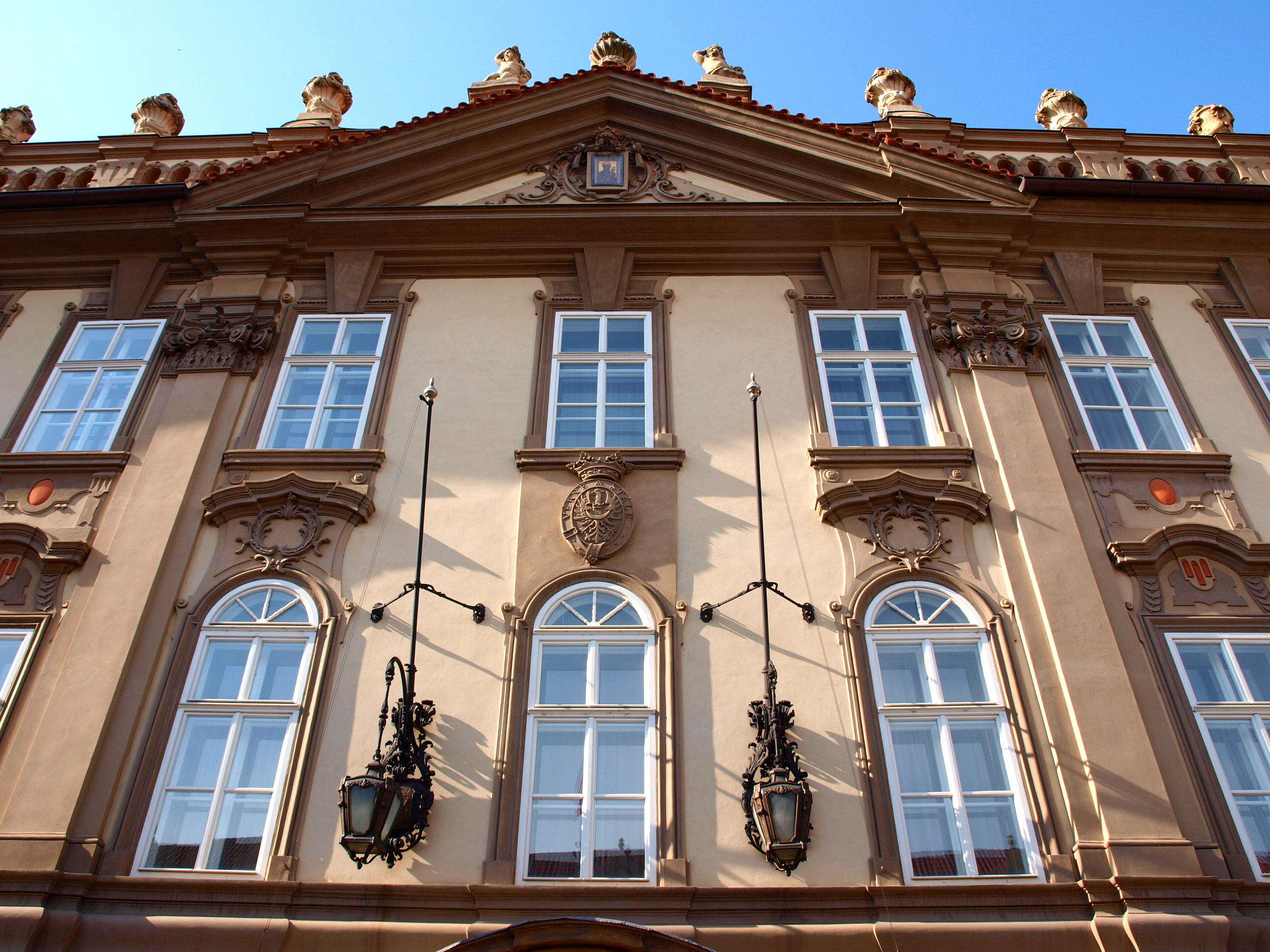 Kolovratský palác (Praha, Valdštejnská)